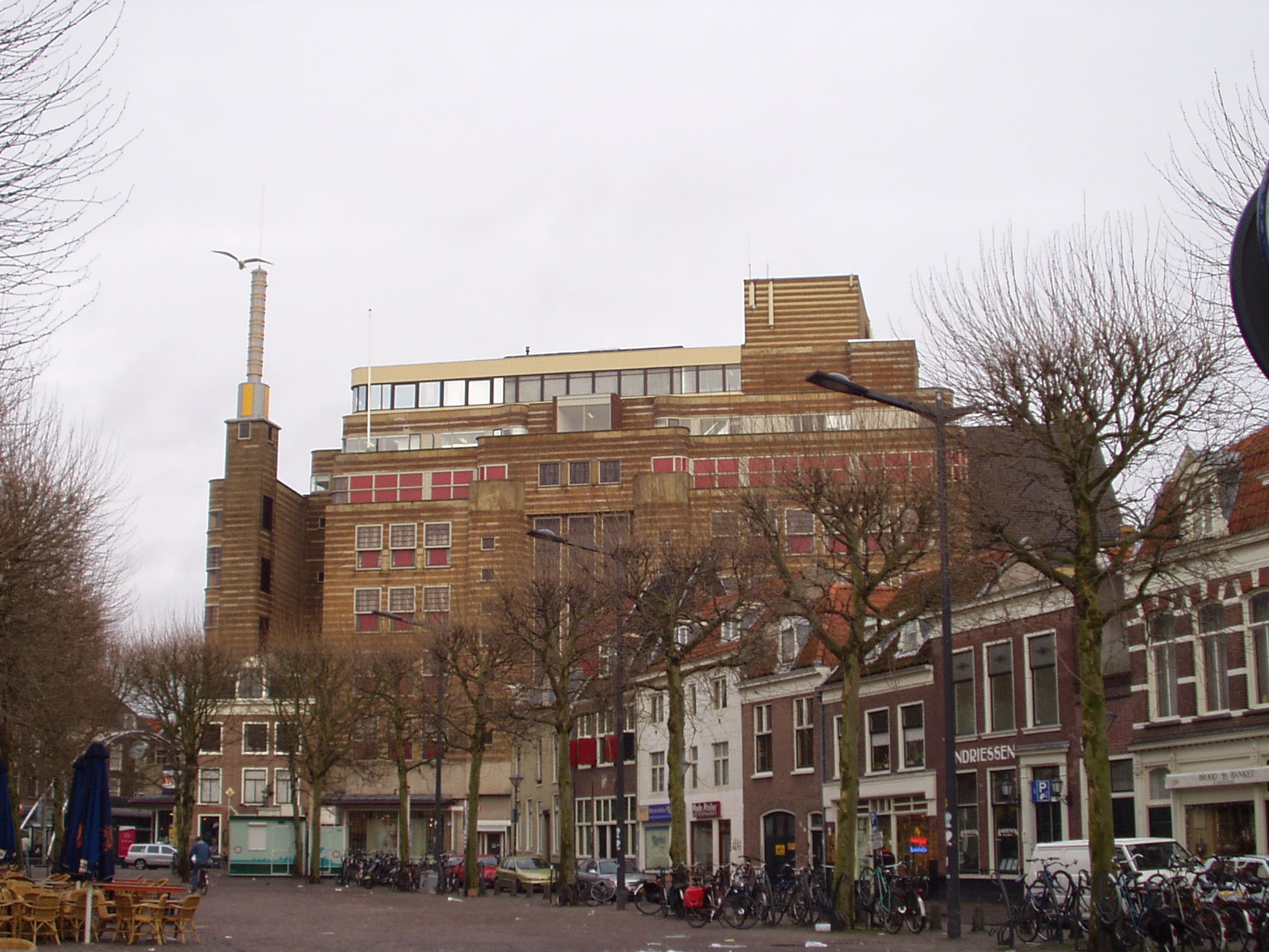 Vroom en Dreesman aan de Botermarkt (Buttermarket) in Haarlem, Netherlands